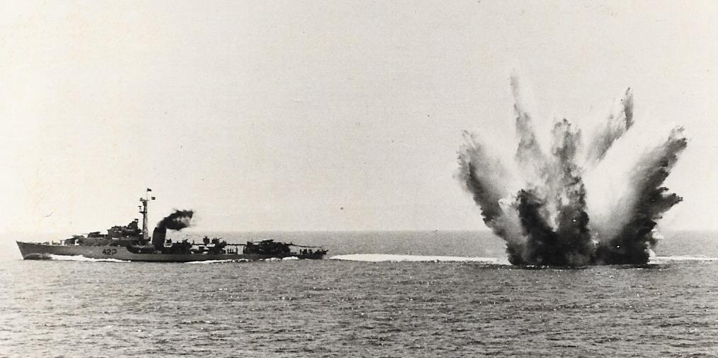 הטלת פצצת עומק מירכתי המשחתת להקניית תחושת הפיצוץ